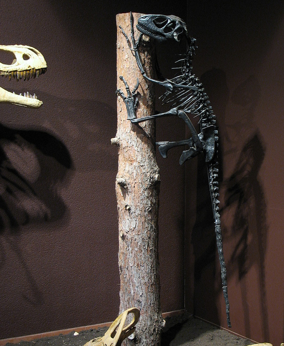 Il tesoro paleontologico della Russia